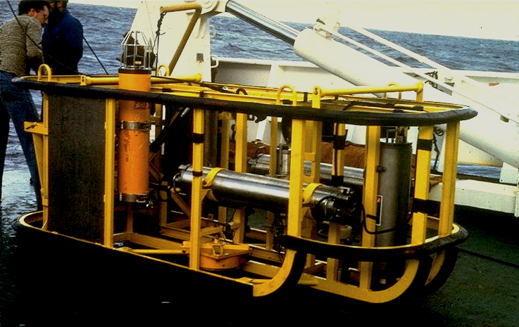 Engin remorqué RAIE 2 pour prises de vue utilisé sur le N/O Jean Charcot - mission SEANOD - Pacifique équatorial nord - Ifremer